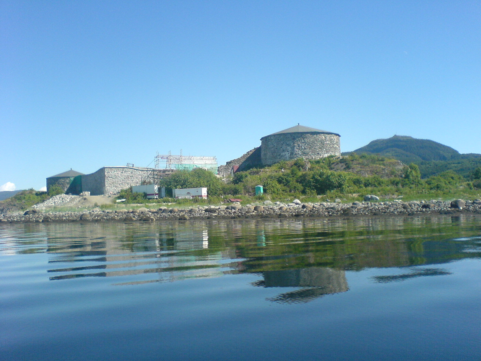 Steinvikholm in Trondheimsfjord. Forbordsfjellet in the background.